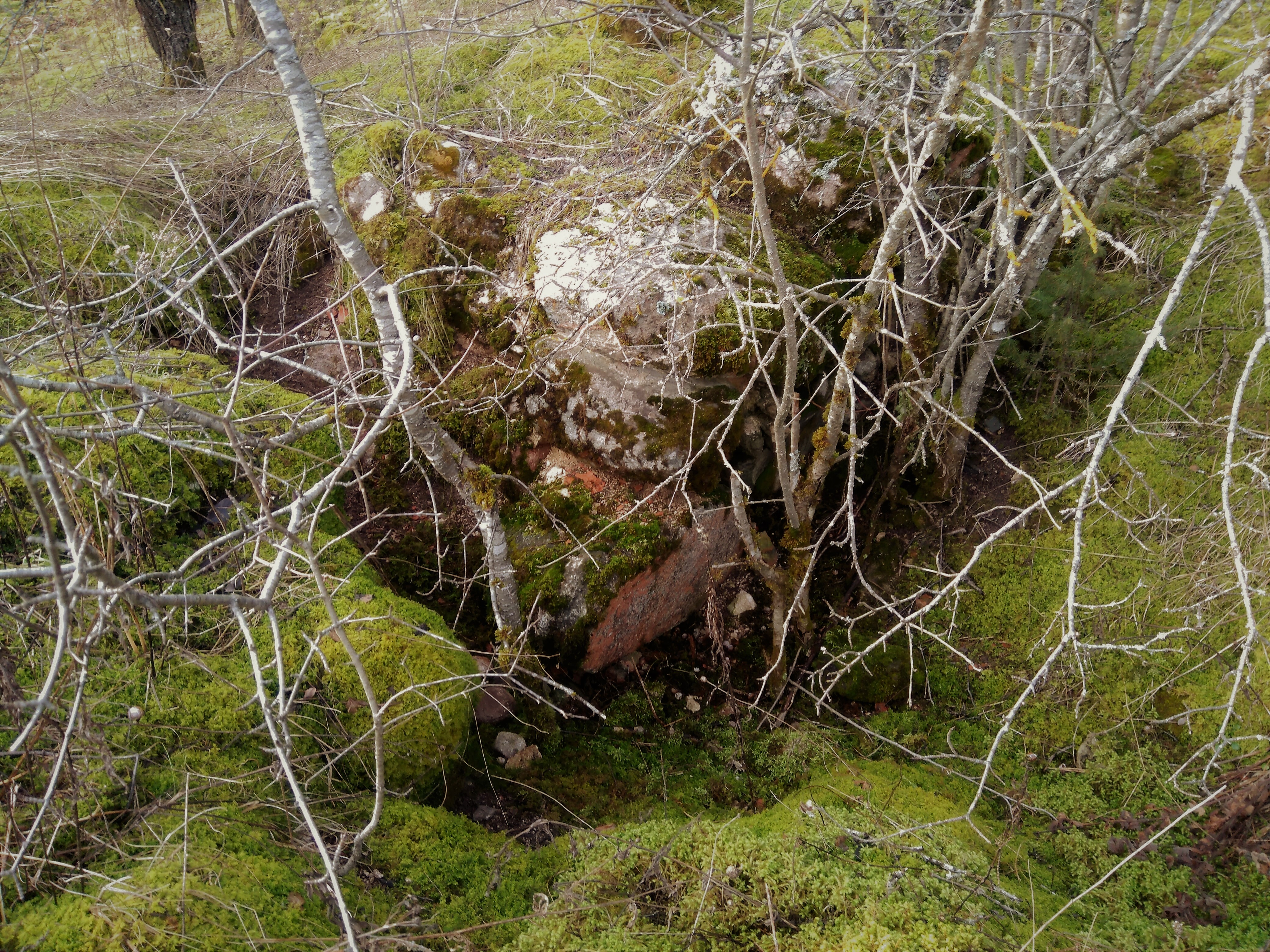 Vaade lõunast linnuse maa-ala sisehoovi loodekülje müüridele.